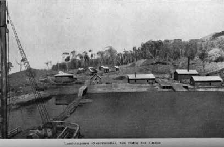 Se puede ver una fotografía de una estación ballenera desde un barco entrando por una bahía.